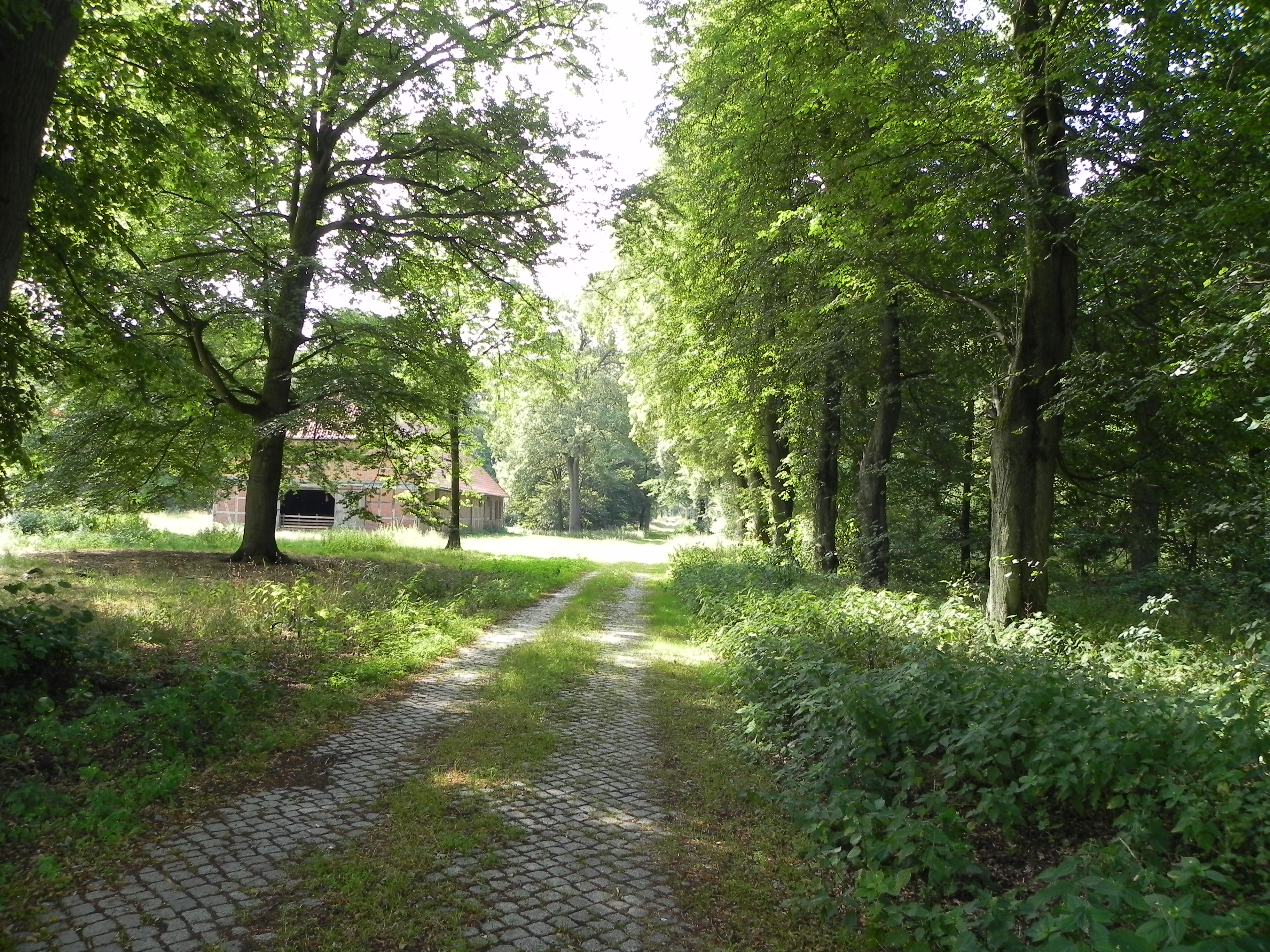 Alte Dorfstraße des ehemaligen Ortes Ettenbostel